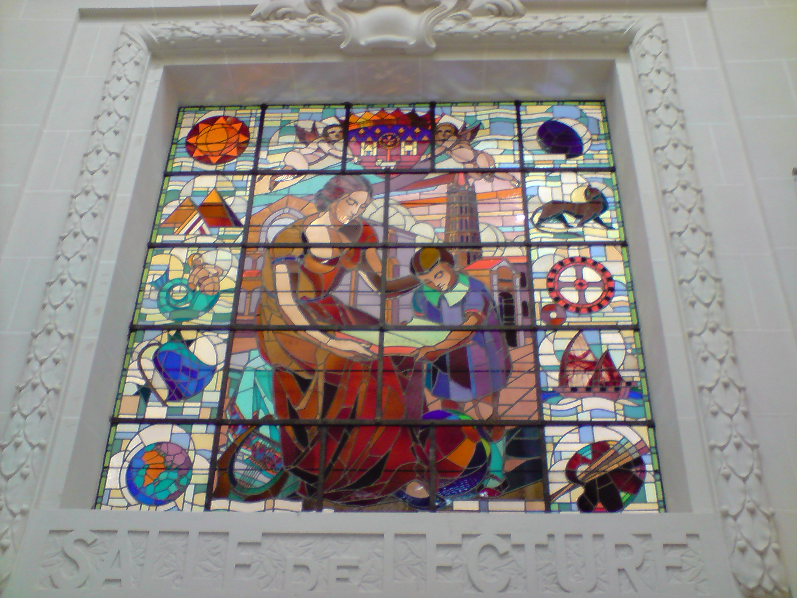 L'éducation de l'enfance par E. Bouillères